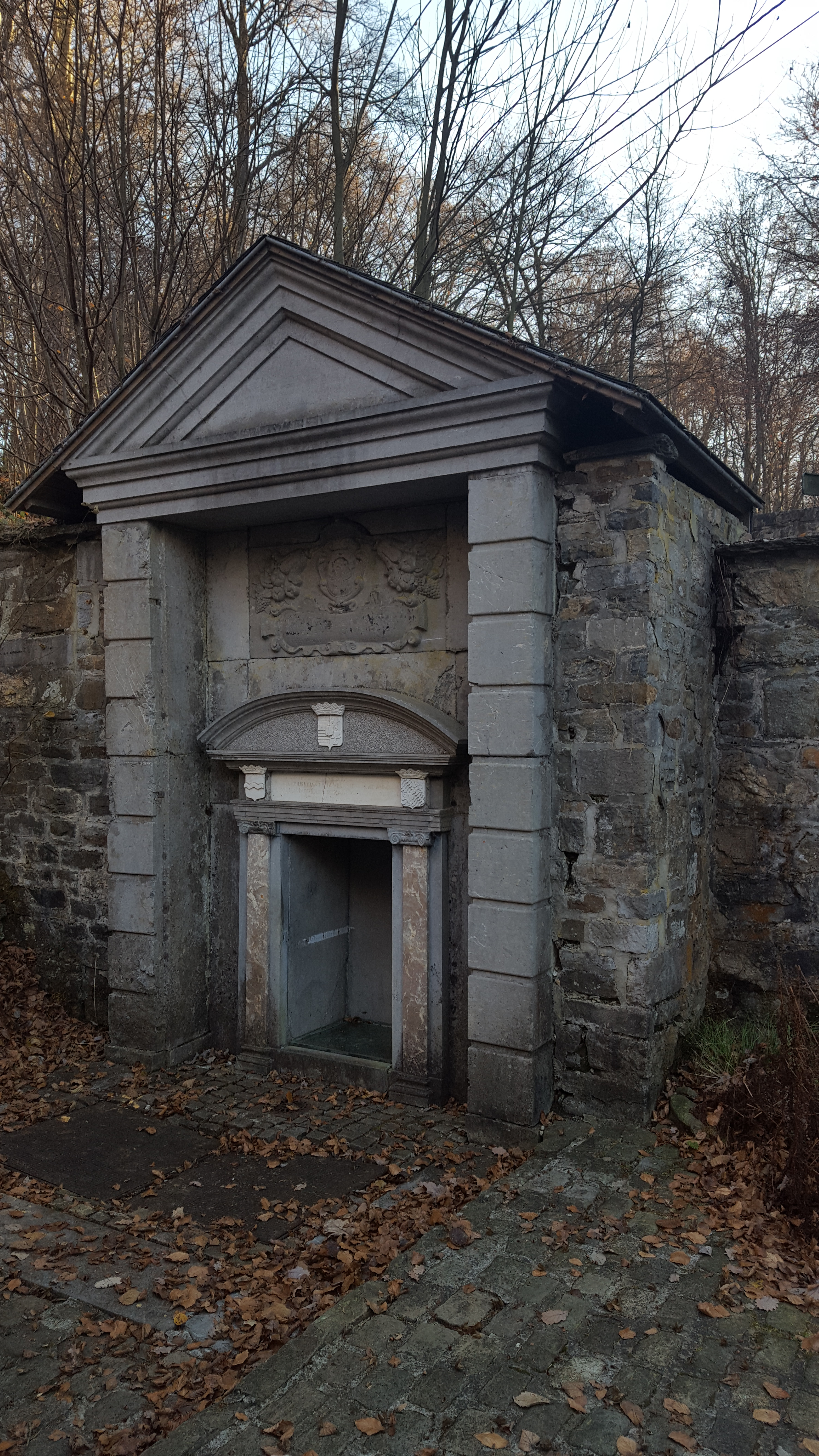 Source de Groesbeek, Spa, Belgique